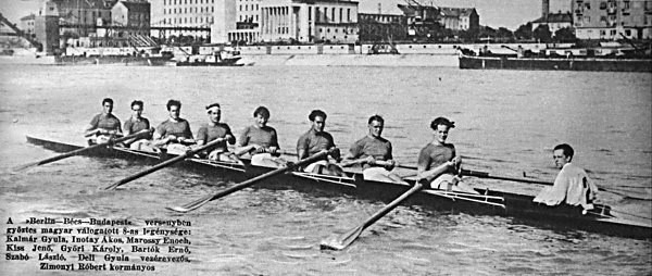 A "Berlin-Bécs-Budapest" versenyben győztes magyar válogatott nyolcas legénysége - Kalmár Gyula, Inotay Ákos, Marossy Enoch, Kiss Jenő, Győri Károly, Bartók Ernő, Szabó László, Deli Gyula vezérevezős, Zimonyi Róbert kormányos.